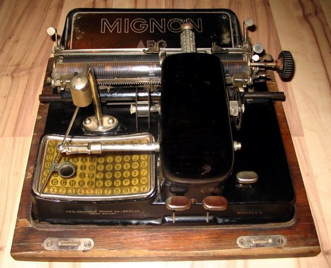 Posnetek pisalnega stroja MIGNON 4.